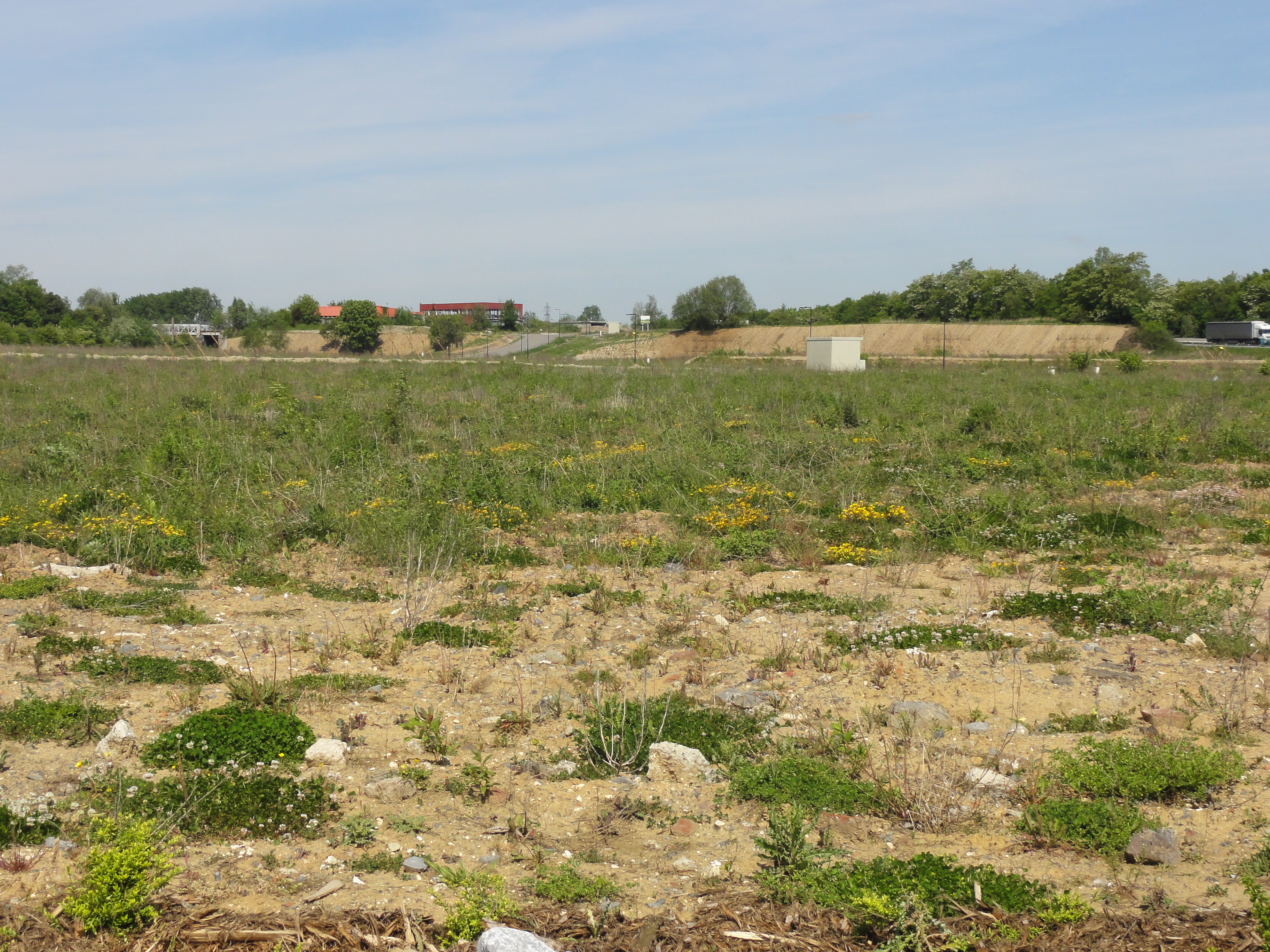 Terril n° 161 dit Rœulx, disparu, Fosse de Rœulx de la Compagnie des mines d'Anzin, Escaudain, Nord, Nord-Pas-de-Calais, France.